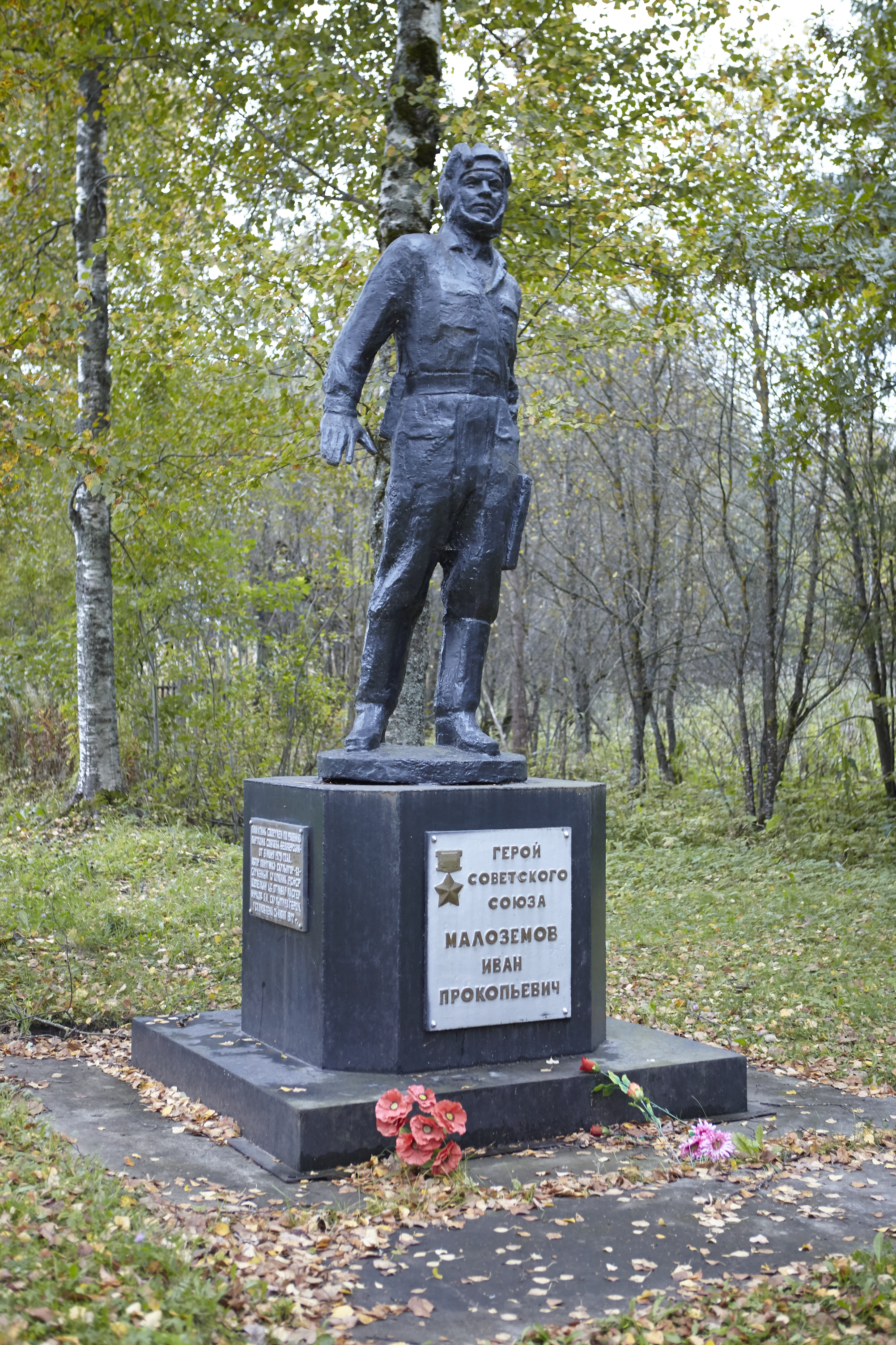 Памятник сооружен по решению парткома совхоза "Белозерский" от 8 июня 197? года. Автор Памятника скульптор - заслуженный художник РСФСР Щепёлкин А.В. Отливал мастер Мячков А.И. Скульптура Героя установлена 26 июня 1977.